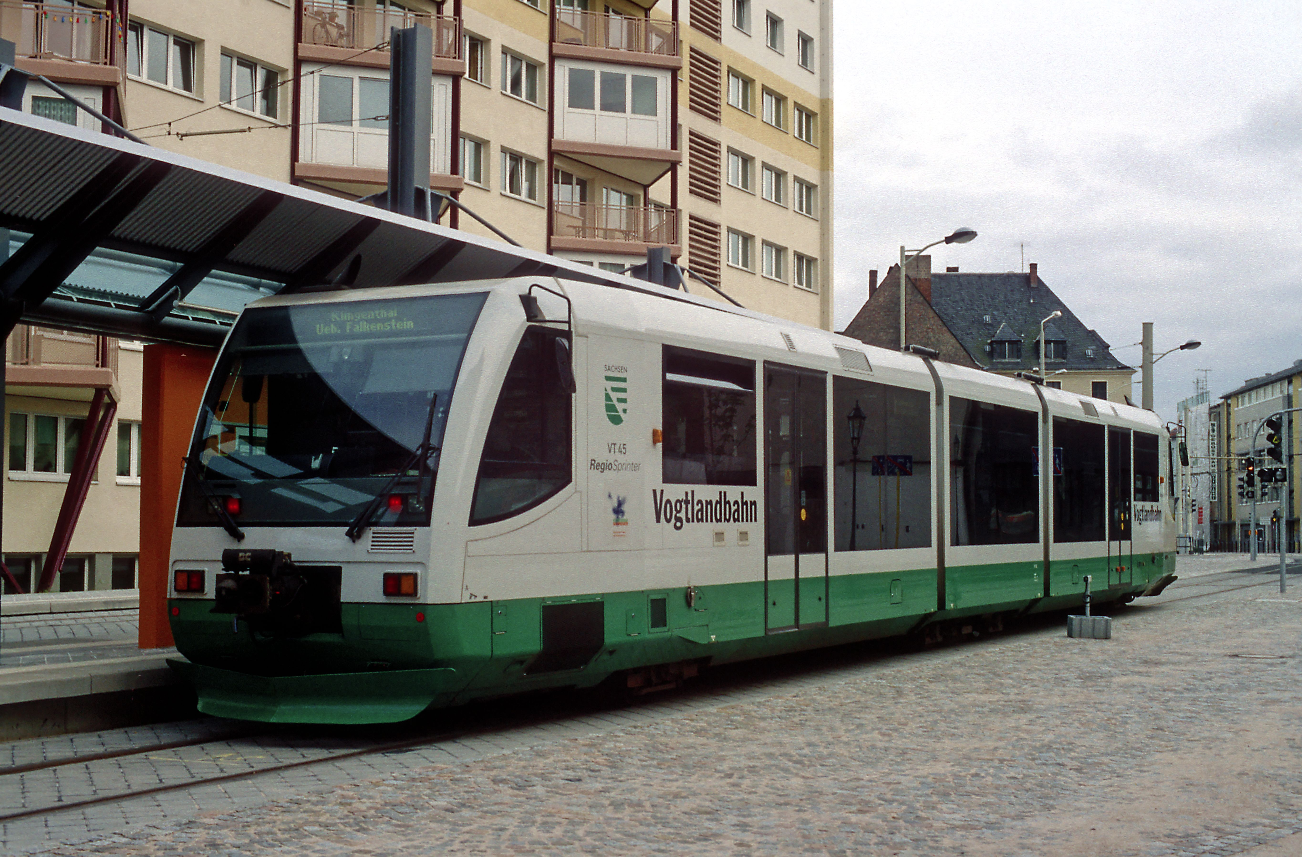 Einer der für den Betrieb nach BO Strab nachgerüsteten »Regiosprinter« am Bahnsteiggleis.